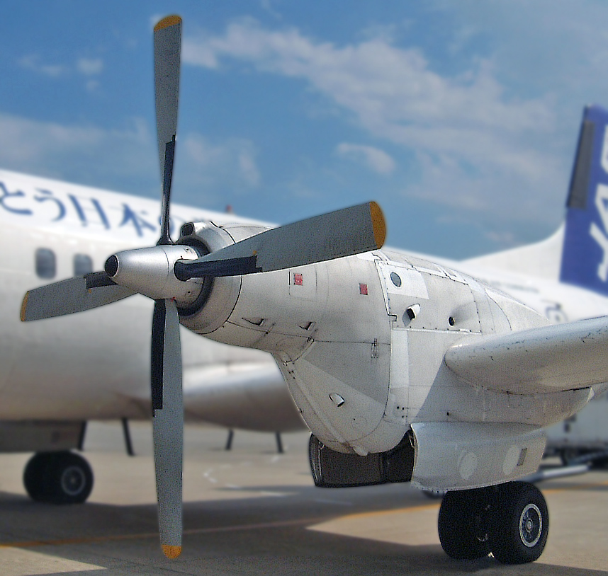 YS-11 左プロペラ